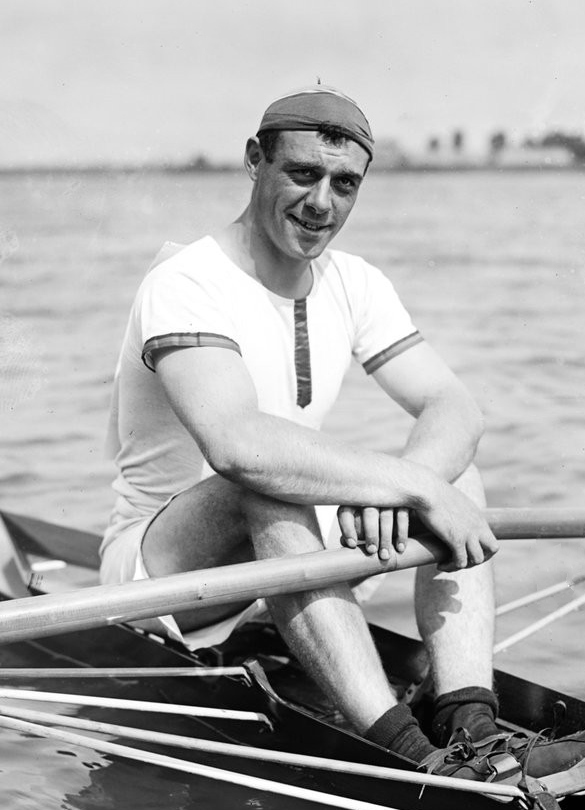 Haller Jacques, Royal club nautique de Gand [skiff, Mâcon, 15/8/20, championnats d'Europe d'aviron] : [photographie de presse] / [Agence Rol]